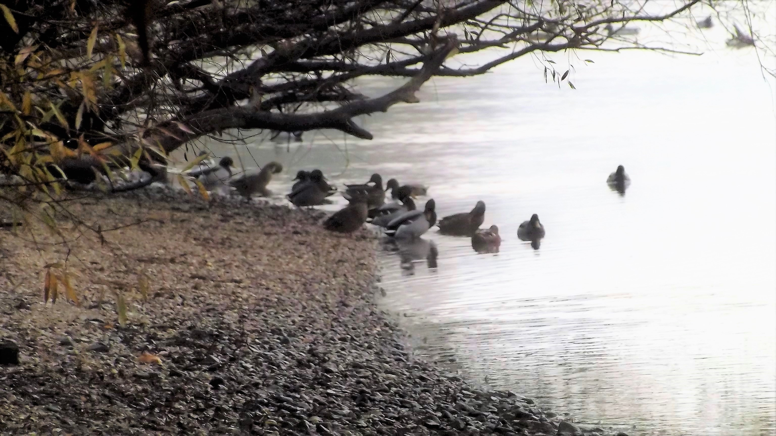 pihenő tőkésrécék